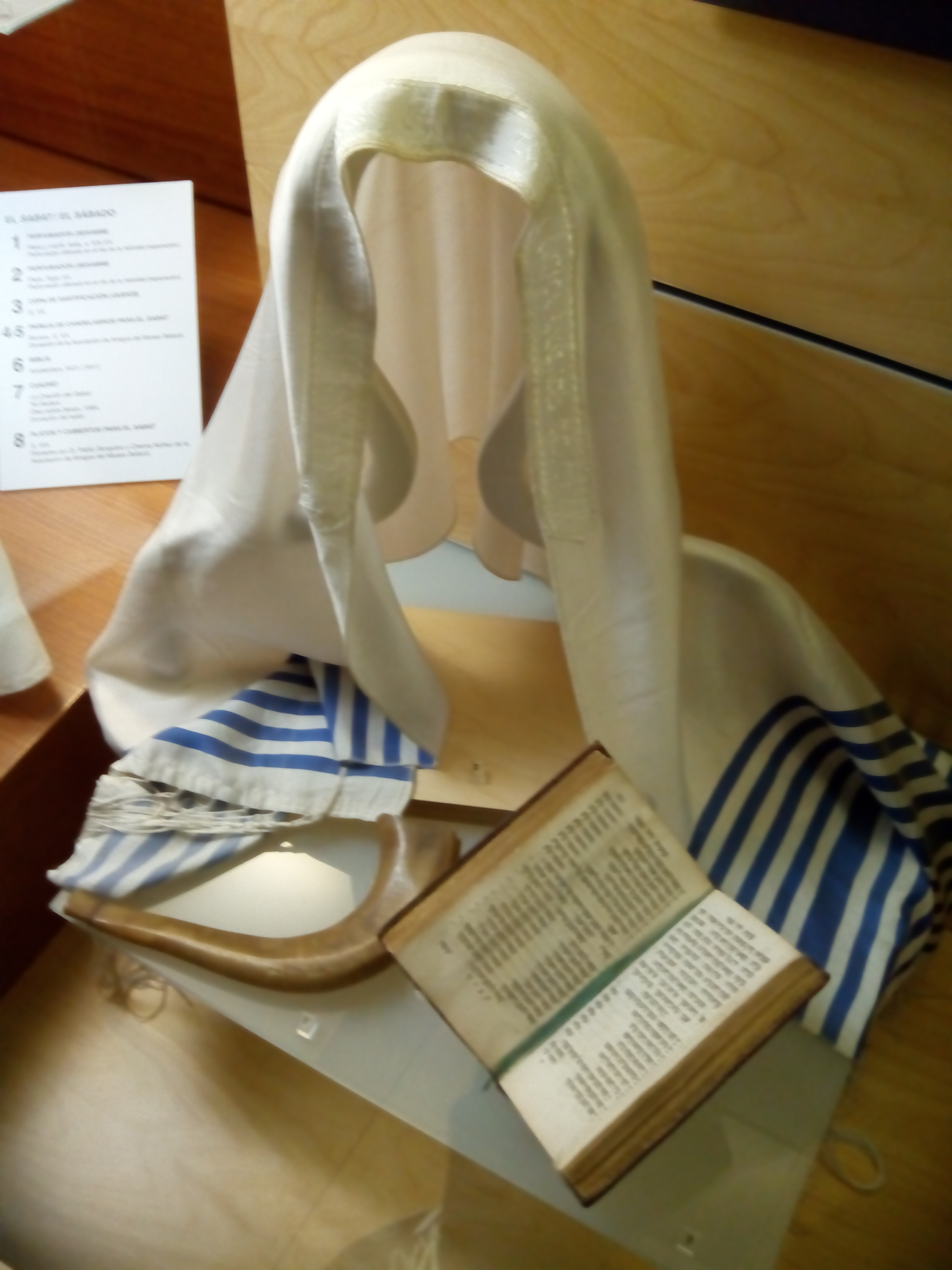 Tallit, museo sefardí, Toledo.